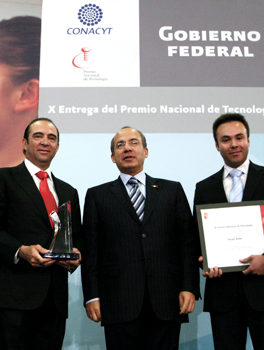 Foto de Eugenio Baeza Fares